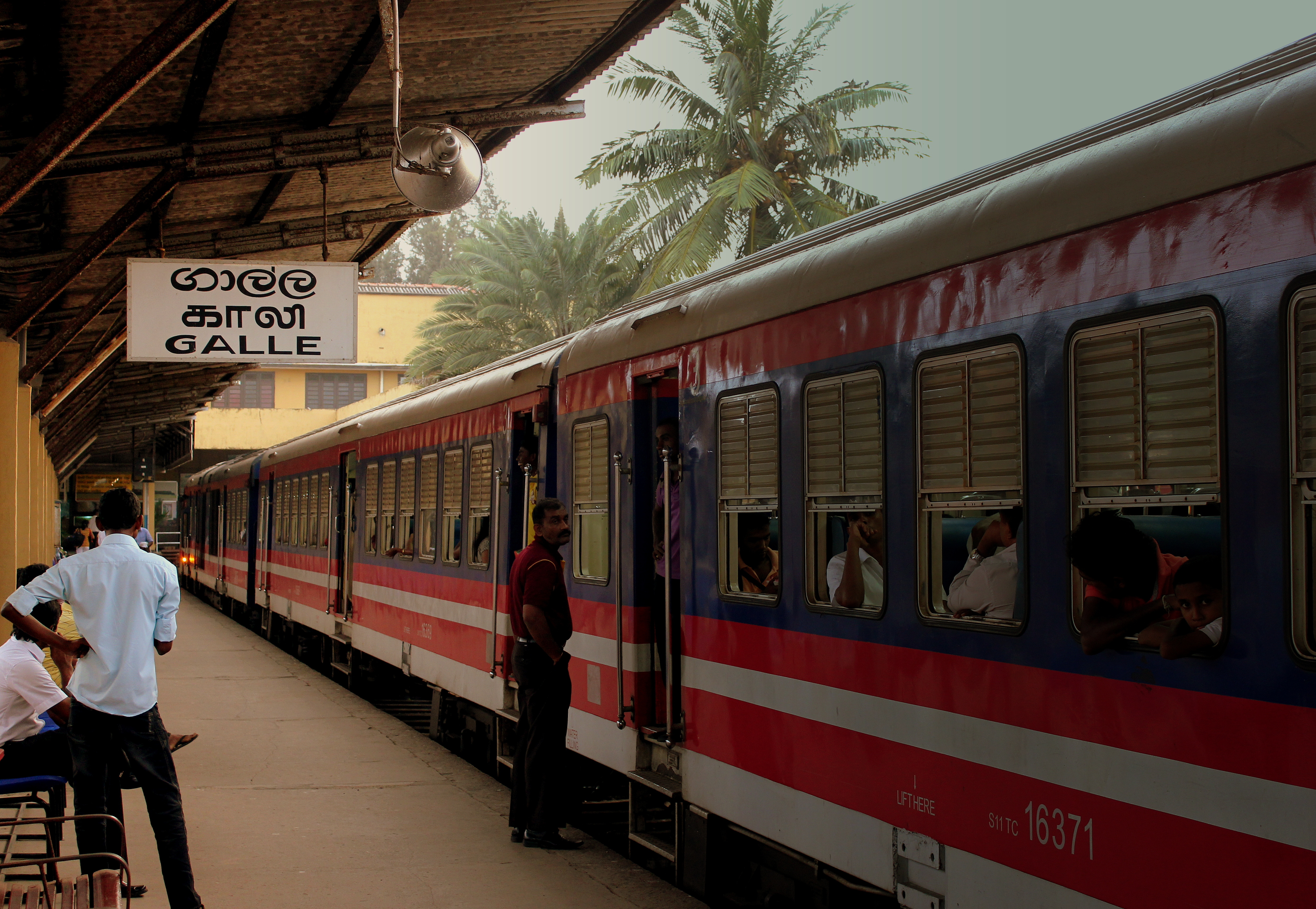 SRI LANKAN RAILWAYS CLASS S11 TRAIN BOUND FOR MATARA AT GALLE STATION SRI LANKA JAN 2013